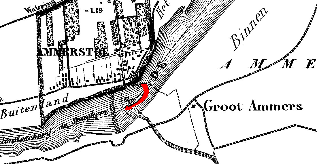 Plaats veer over de Lek van Ammerstol naar Groot Ammers op de kaart van Ammerstol (detail), rode pijl door mij toegevoegd